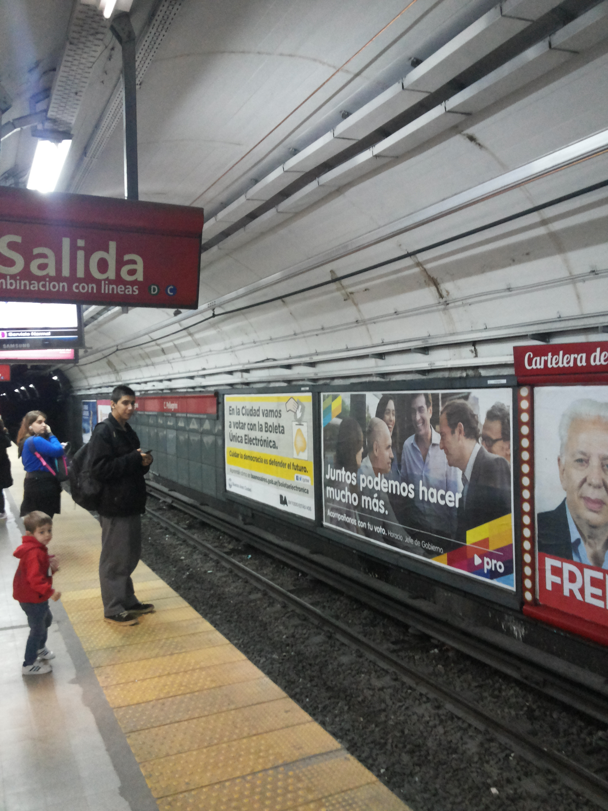 Carlos Pellegrini Subte B